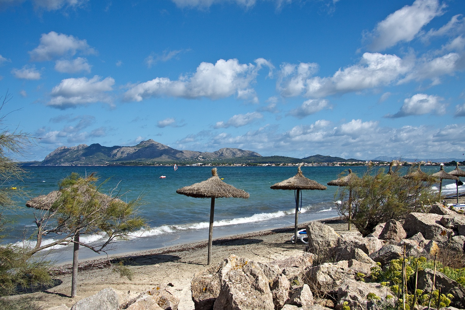 Mallorca, Balearen, Spanien, Datum/Uhrzeit: 24.09.2010 15:58:02